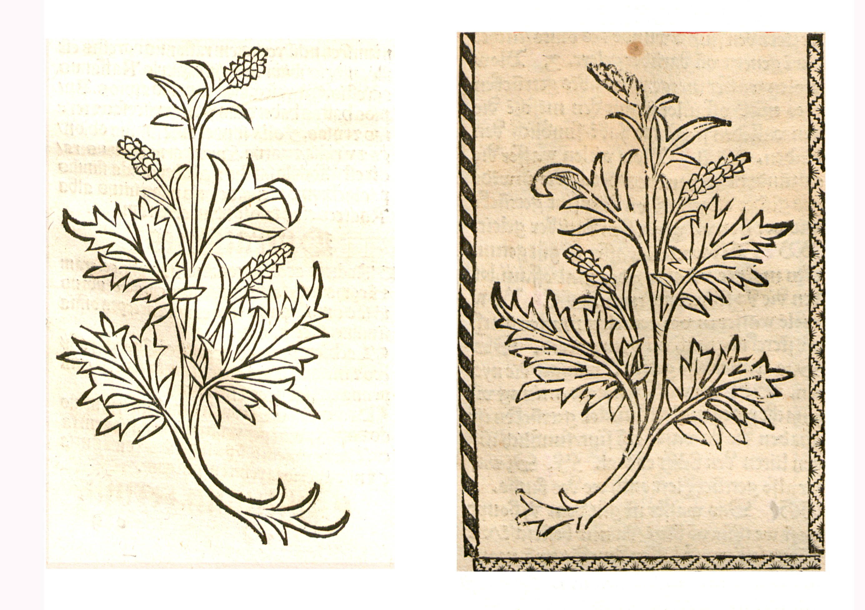 Abbildung von Bucken (Artemisia vulgaris)